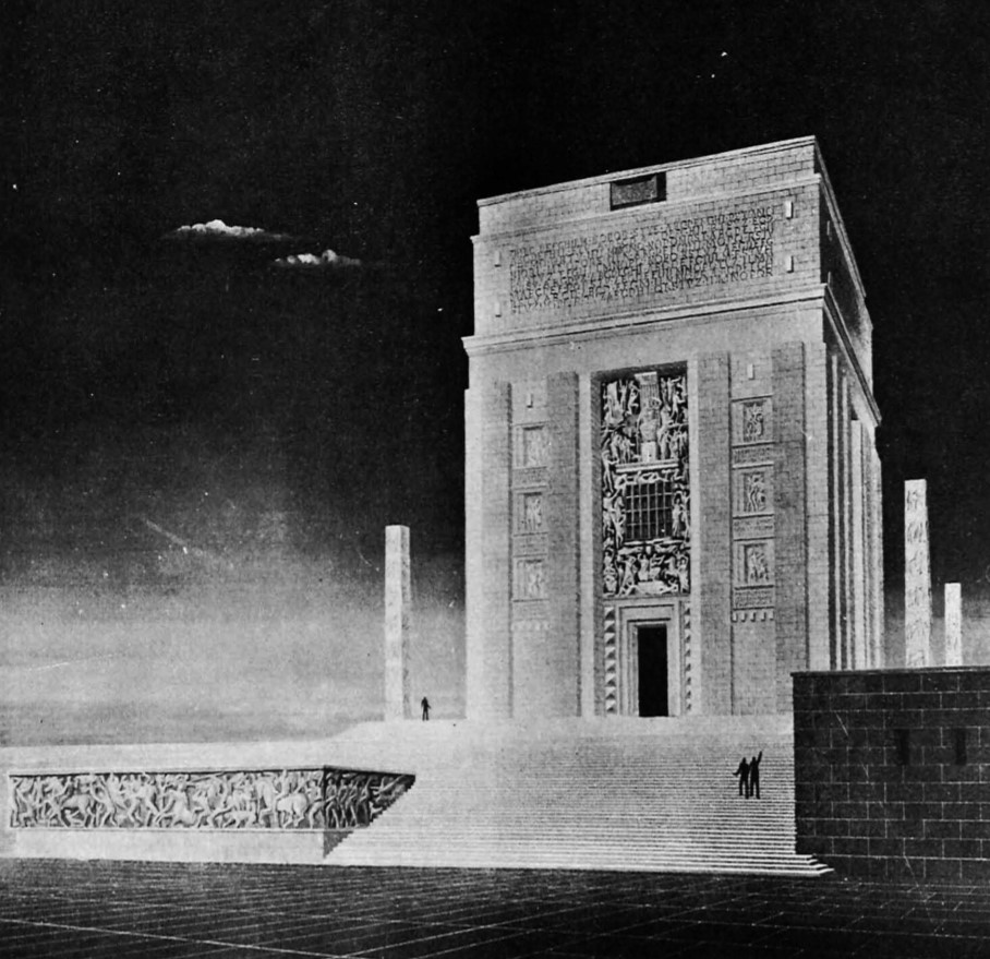 Arnaldo Foschini'nin Anıtkabir projesi